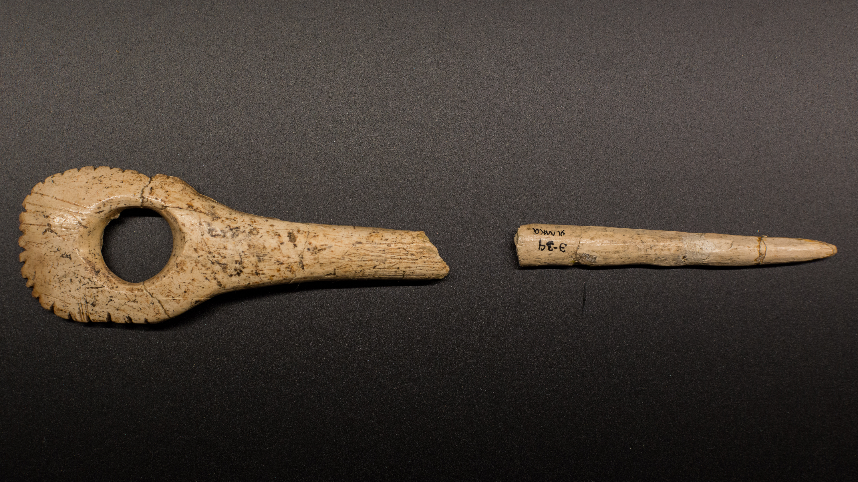 Lochstab, Mammutelfenbein, Fundstelle Kostenki, ca. 25.000 BP, Original, ausgestellt im Archäologischen Museum Hamburg (Eiszeiten - Die Kunst der Mammutjäger vom 18. Oktober 2016 bis 14. Mai 2017). Aufbewahrungsort sonst Kunstkammer Sankt Petersburg, Russland.